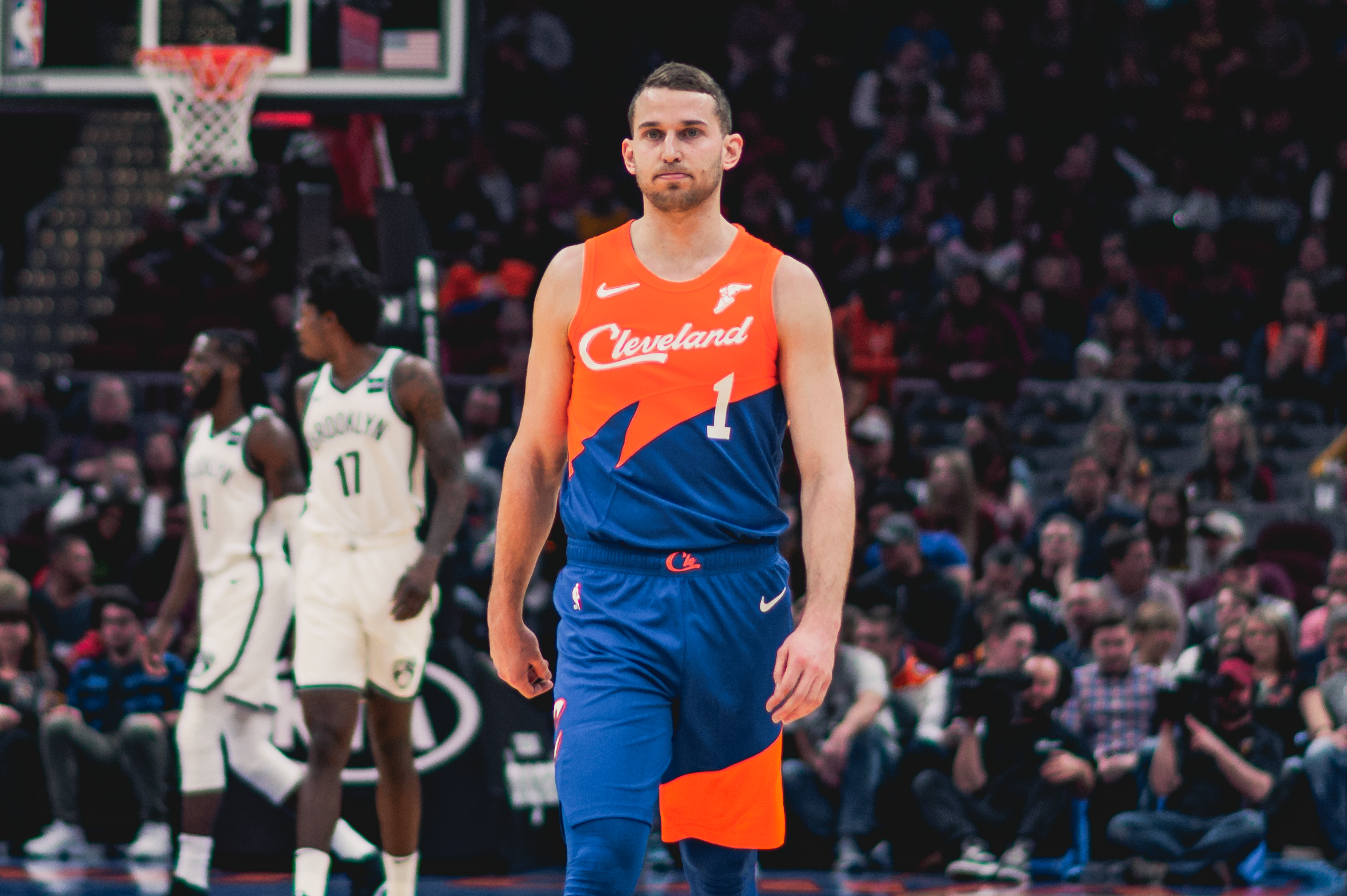 Cleveland Cavaliers vs. Brooklyn Nets